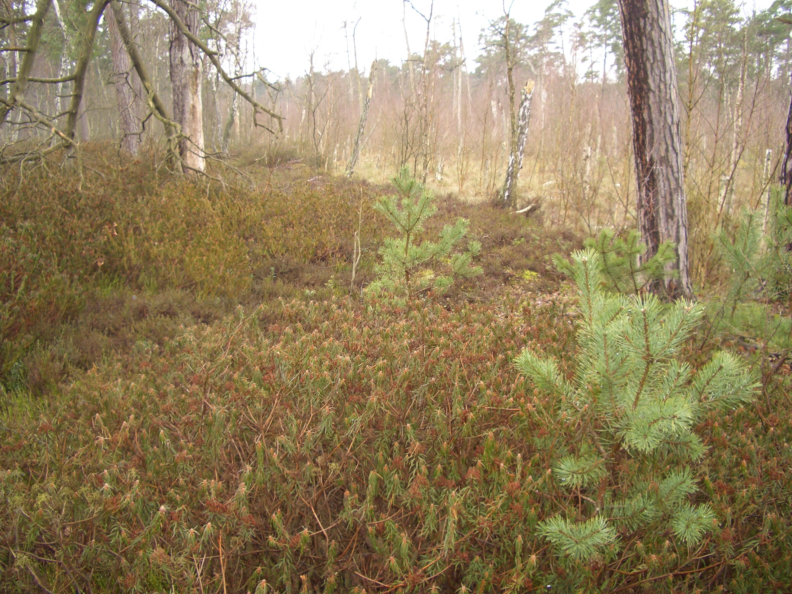 Zerninseesenke. Hochmoor - Google Maps - Google Earth